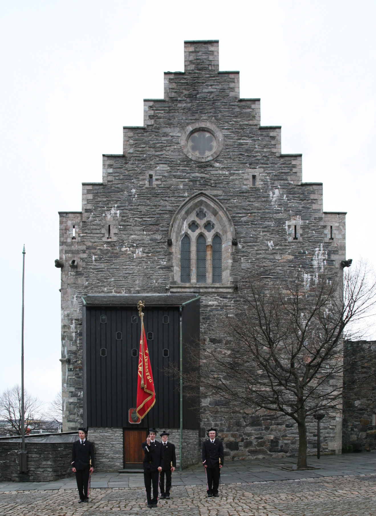 Håkonshallen i Bergen